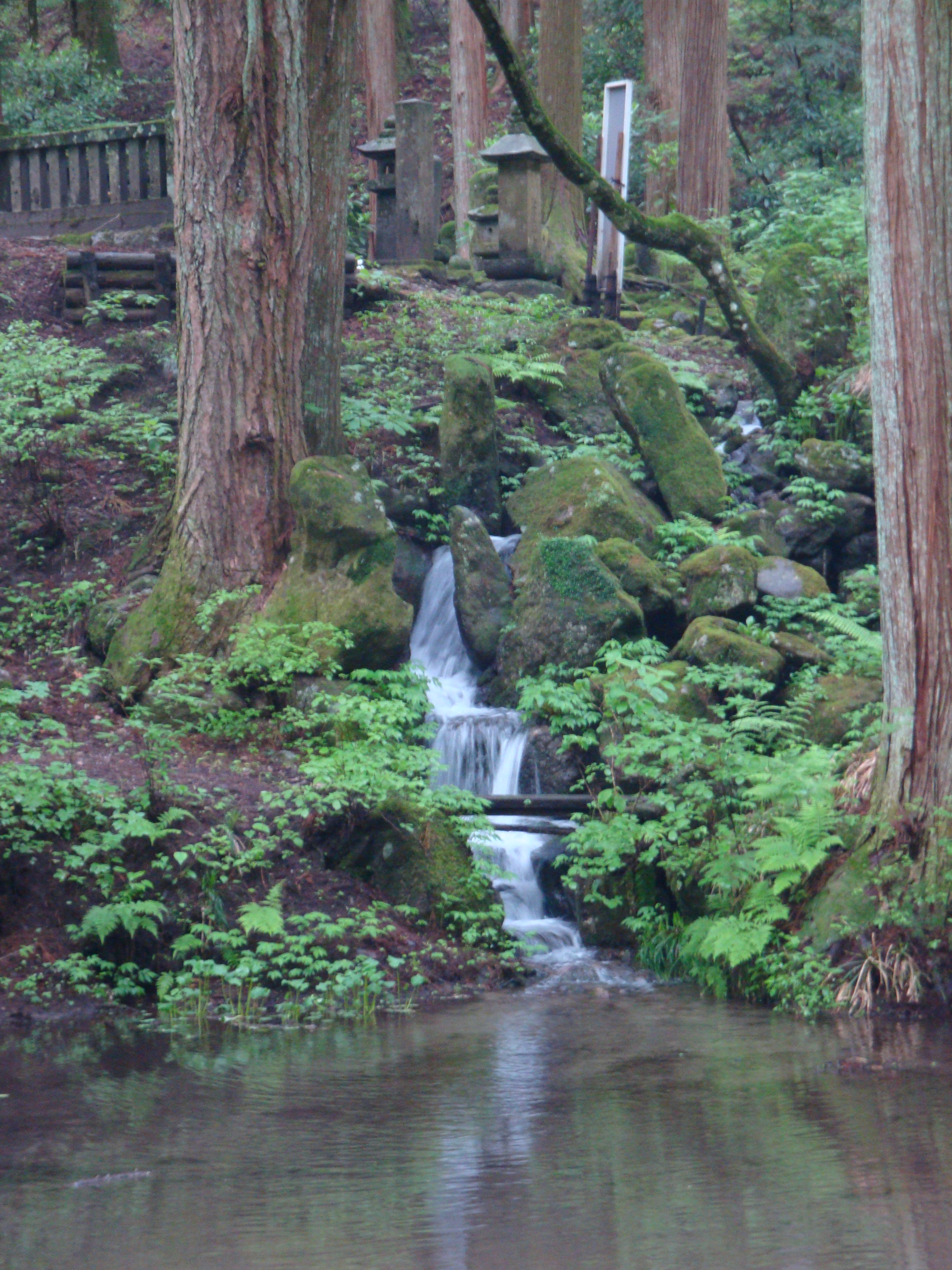 本堂前庭園 鯉魚石を意匠下竜門瀑滝石組 鎌倉時代作庭